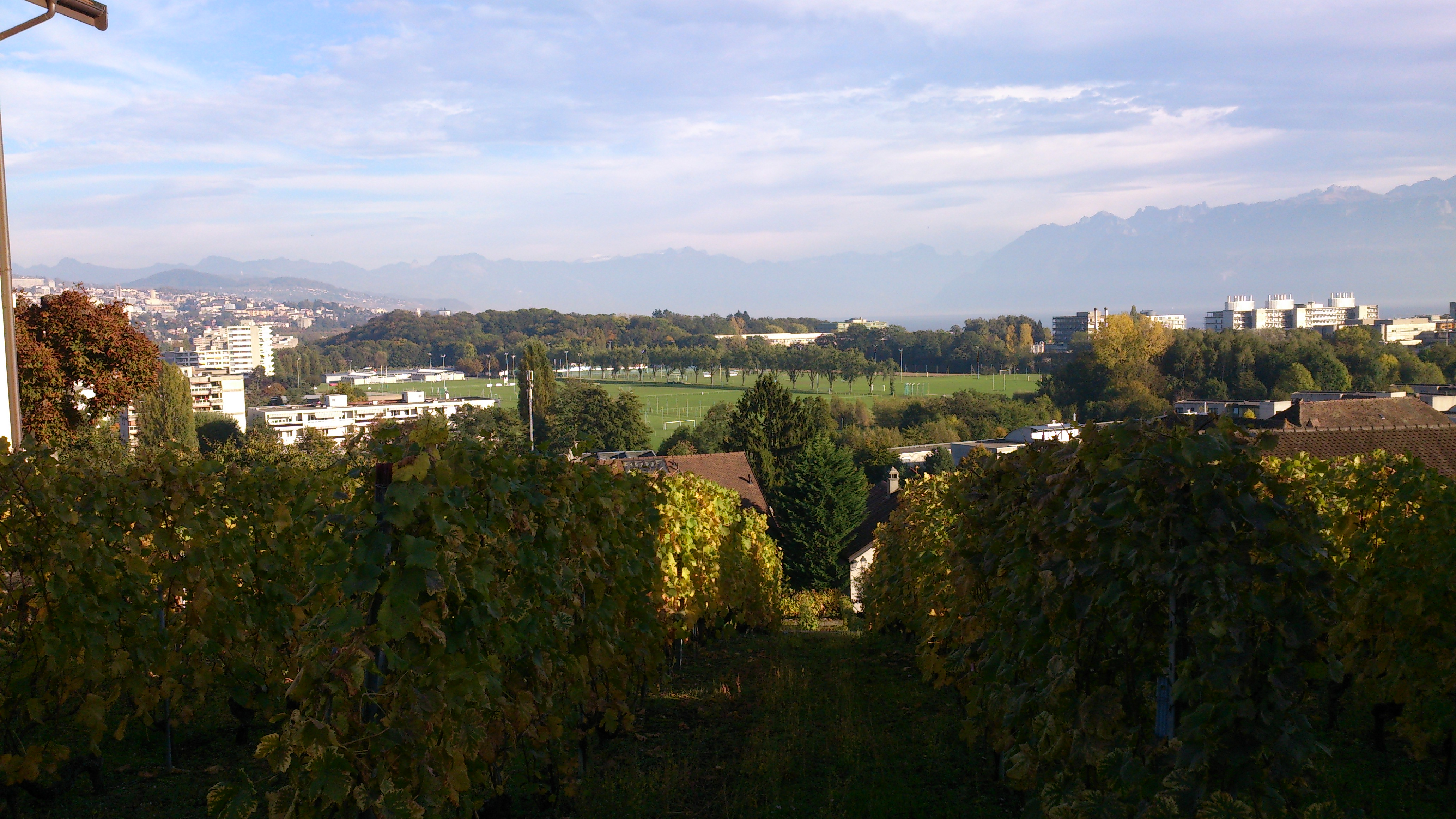 Ecublens